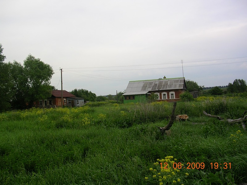 Деревня Костыли Михайловского района Рязанской области